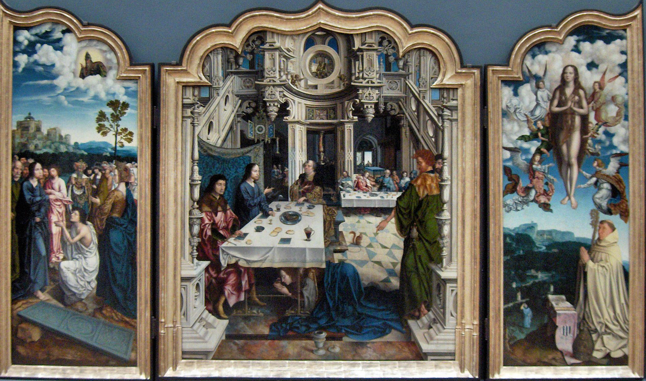 Triptiek van de abdij van Dielegem. Middenpaneel: Jezus bij Simon de Farizeeër, linkerluik: de opwekking van Lazarus, rechterluik: De tenhemelopneming van Maria Magdalena en een premonstratenzer abt als schenker